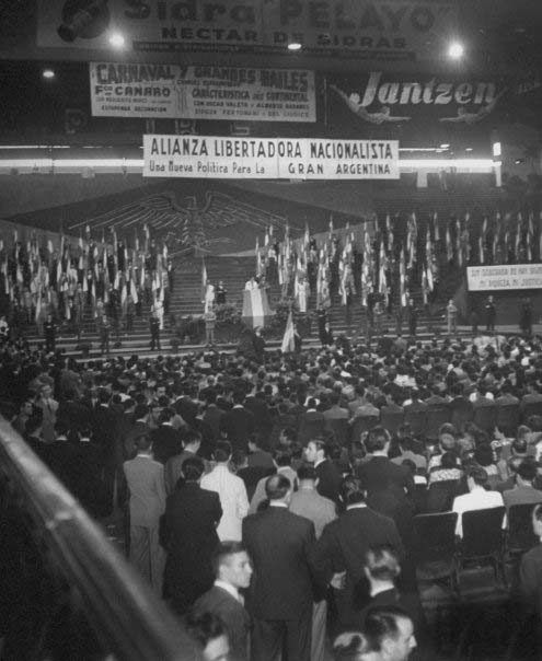 Alianza Libertadora Nacionalista, congreso (1943?)